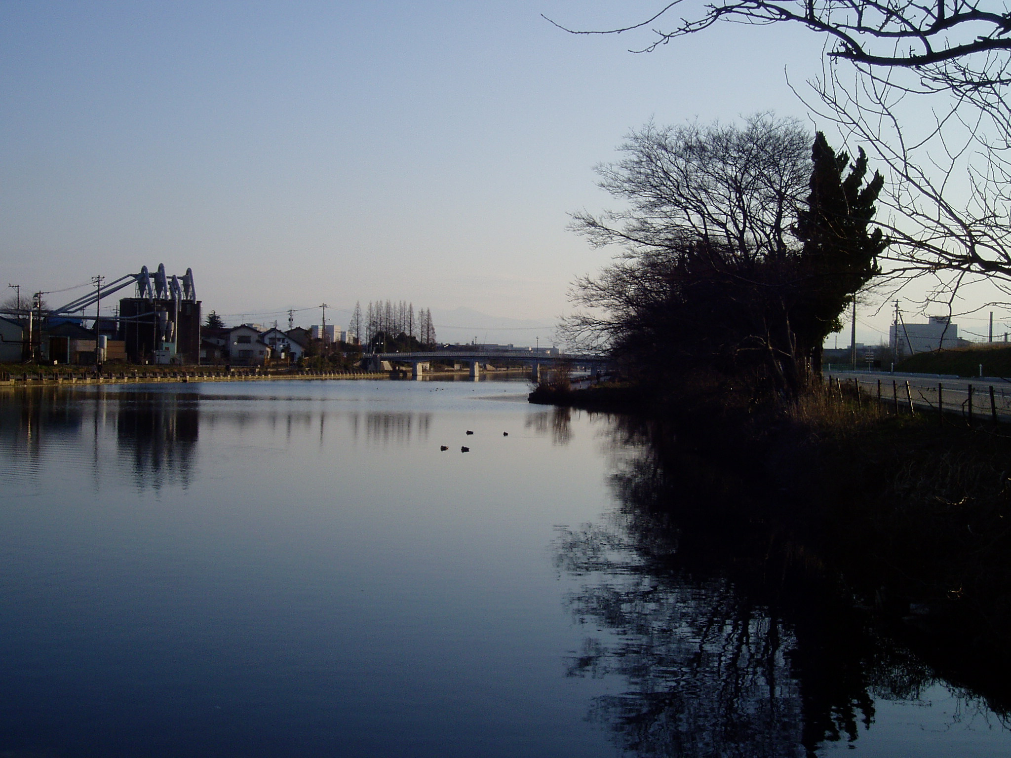 中島閘門付近から撮影した富岩運河